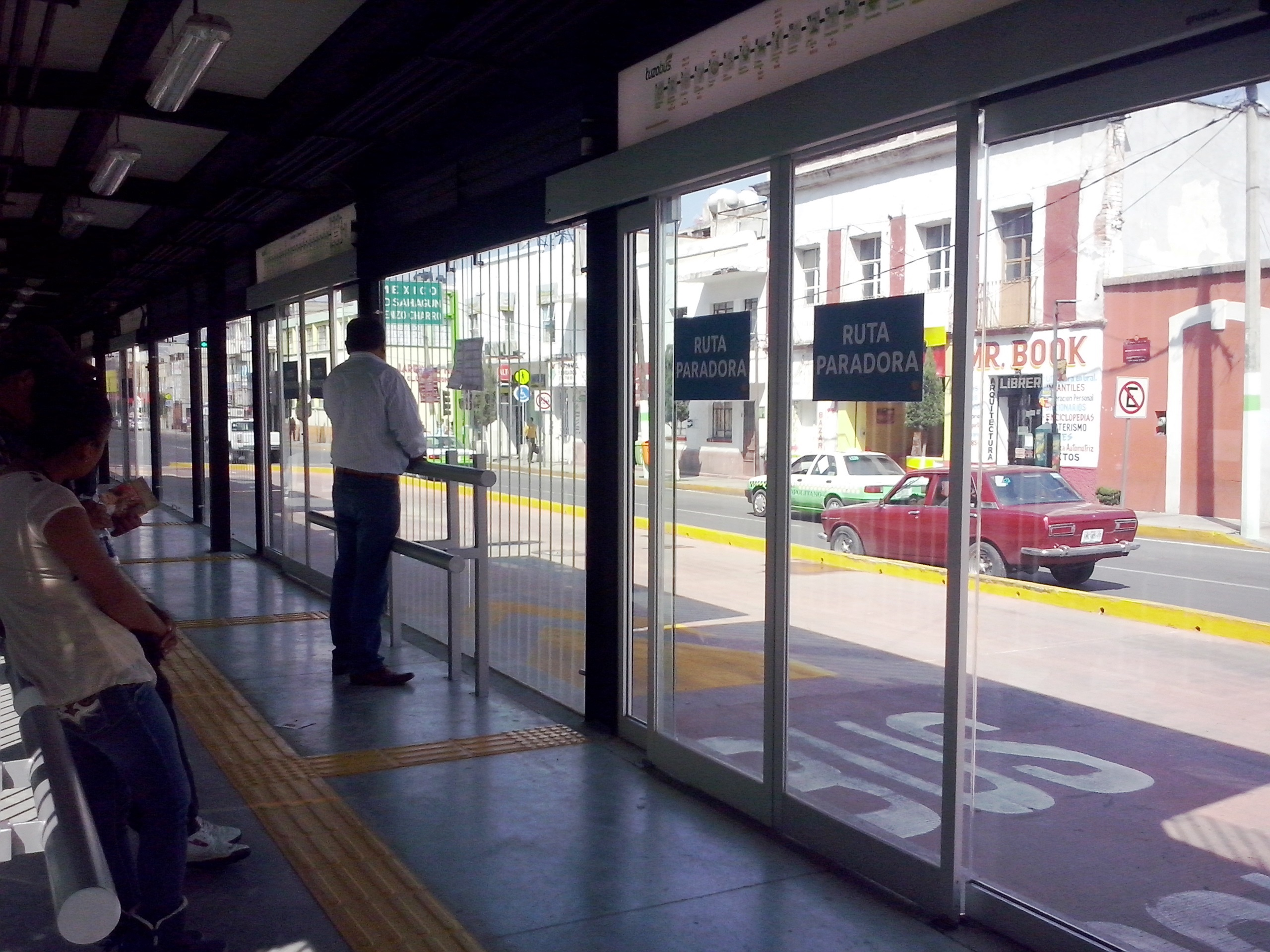 Estación Plaza Juárez del Tuzobús.